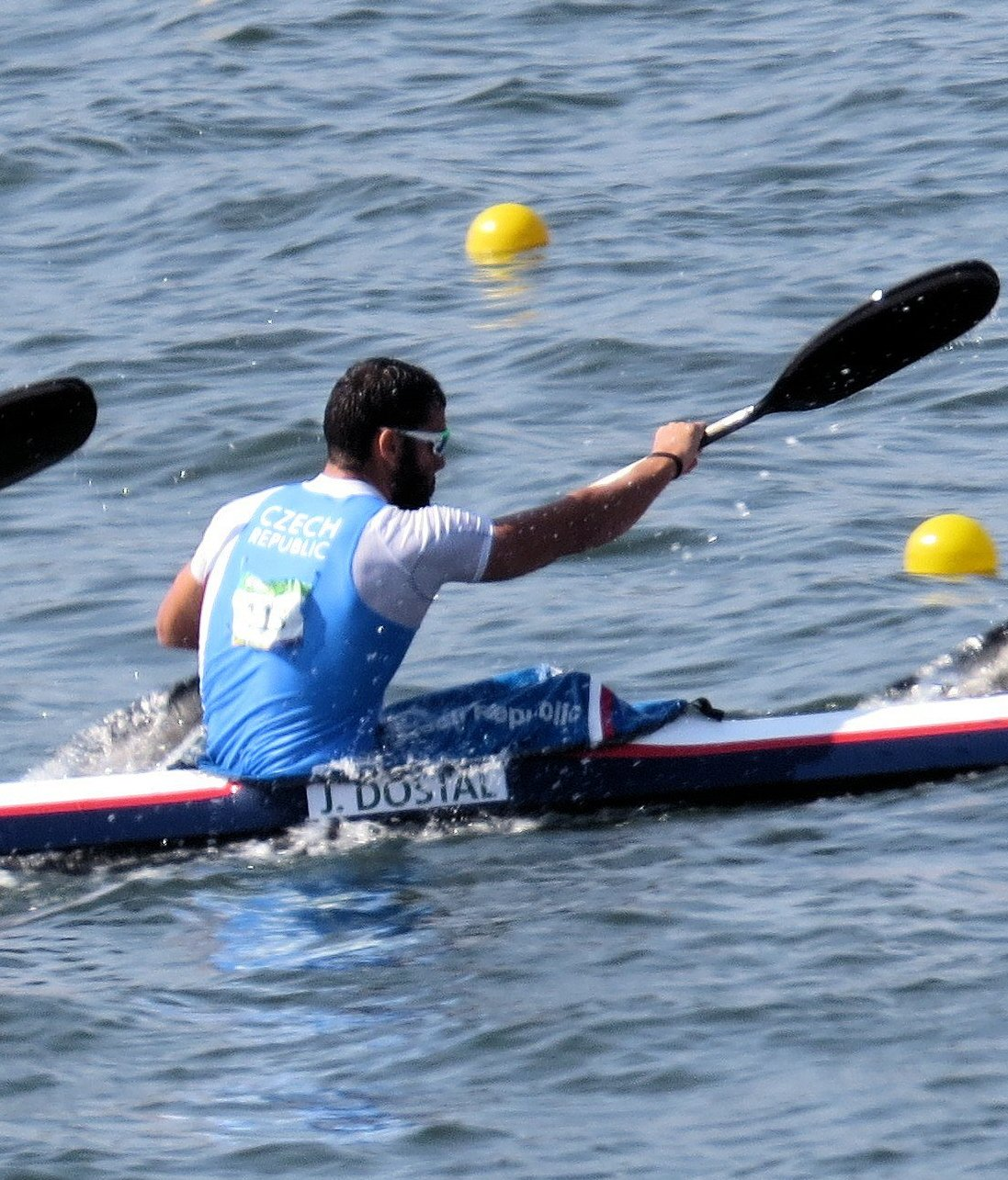 Sx50